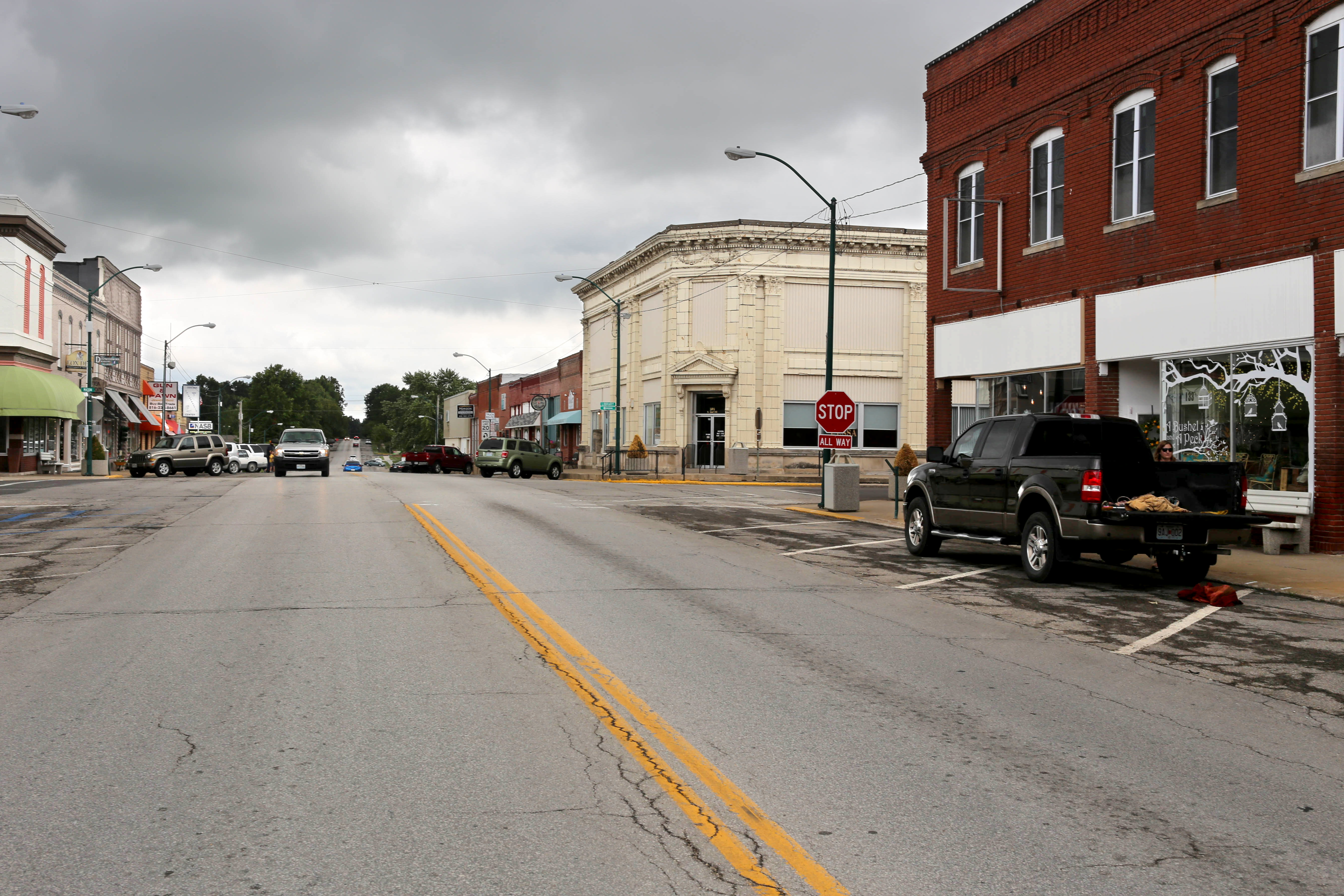 Odessa, MO